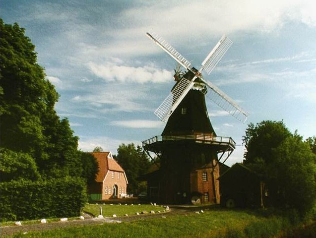 Moorseer Mühle / Die Galerie-Holländer-Windmühle in Nordenham-Moorsee.